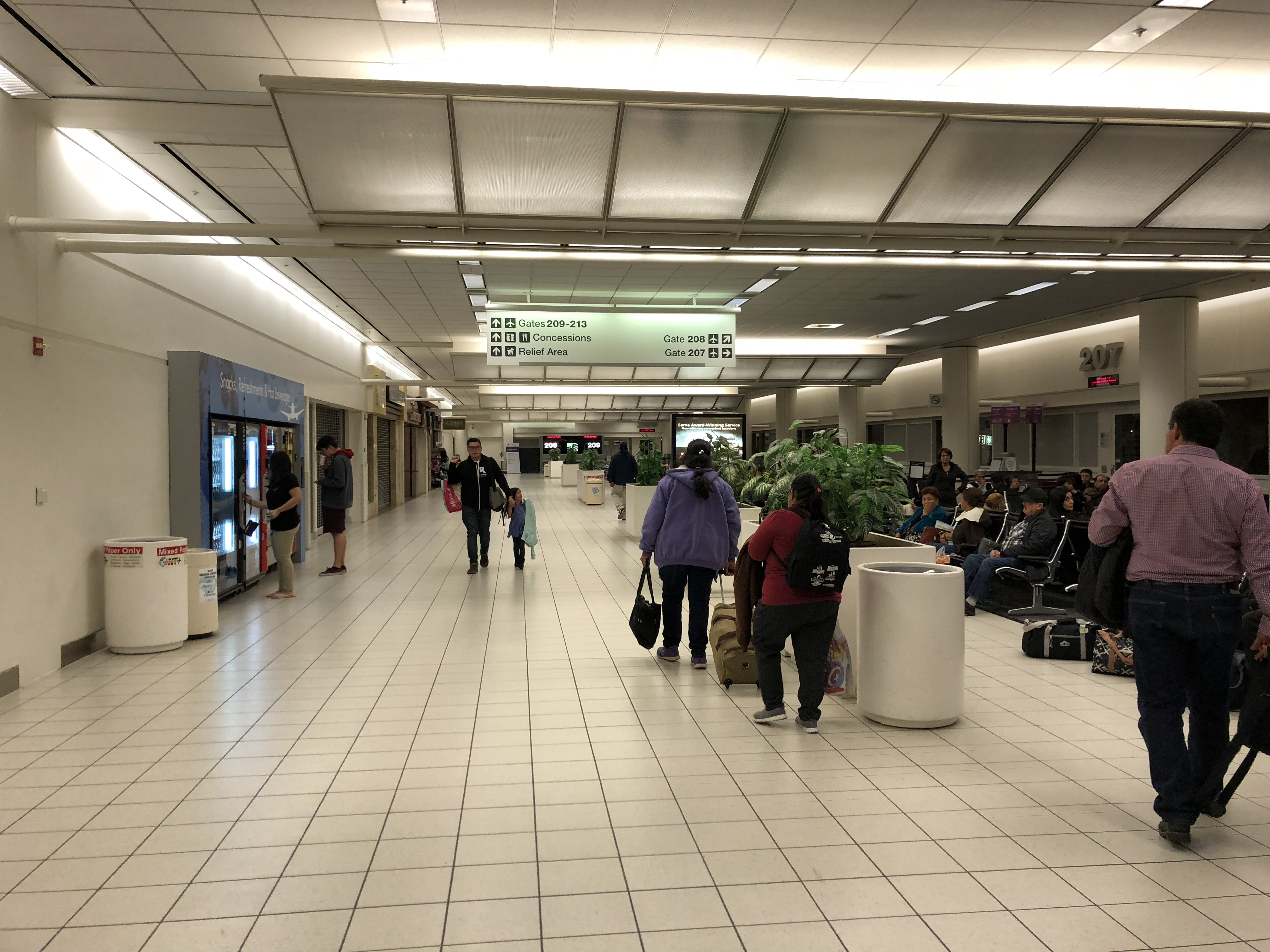 Pasillo principal de la Terminal 2 del Aeropuerto Internacional de Ontario.